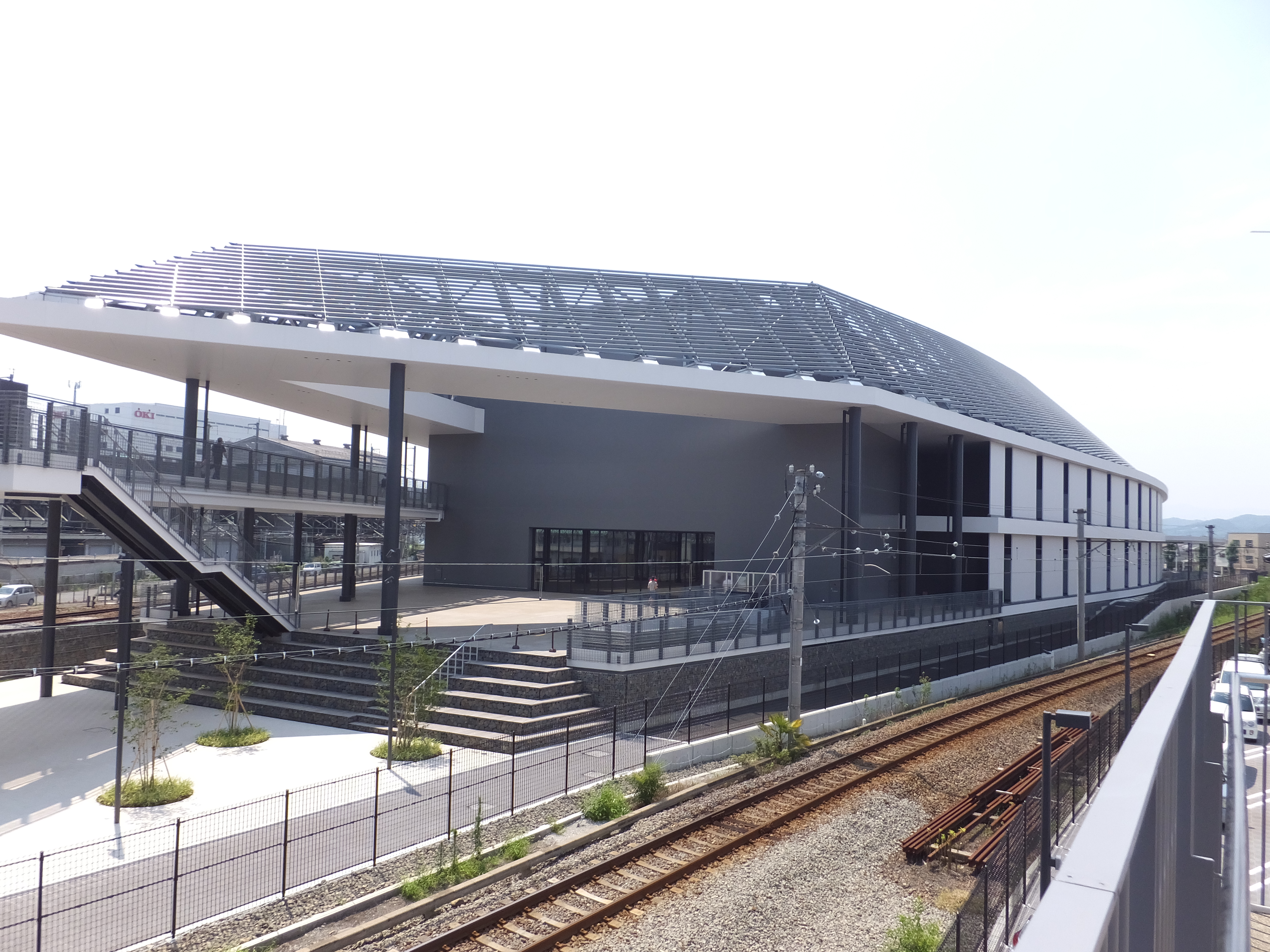 高崎アリーナ外観 北側。 2017年7月撮影。